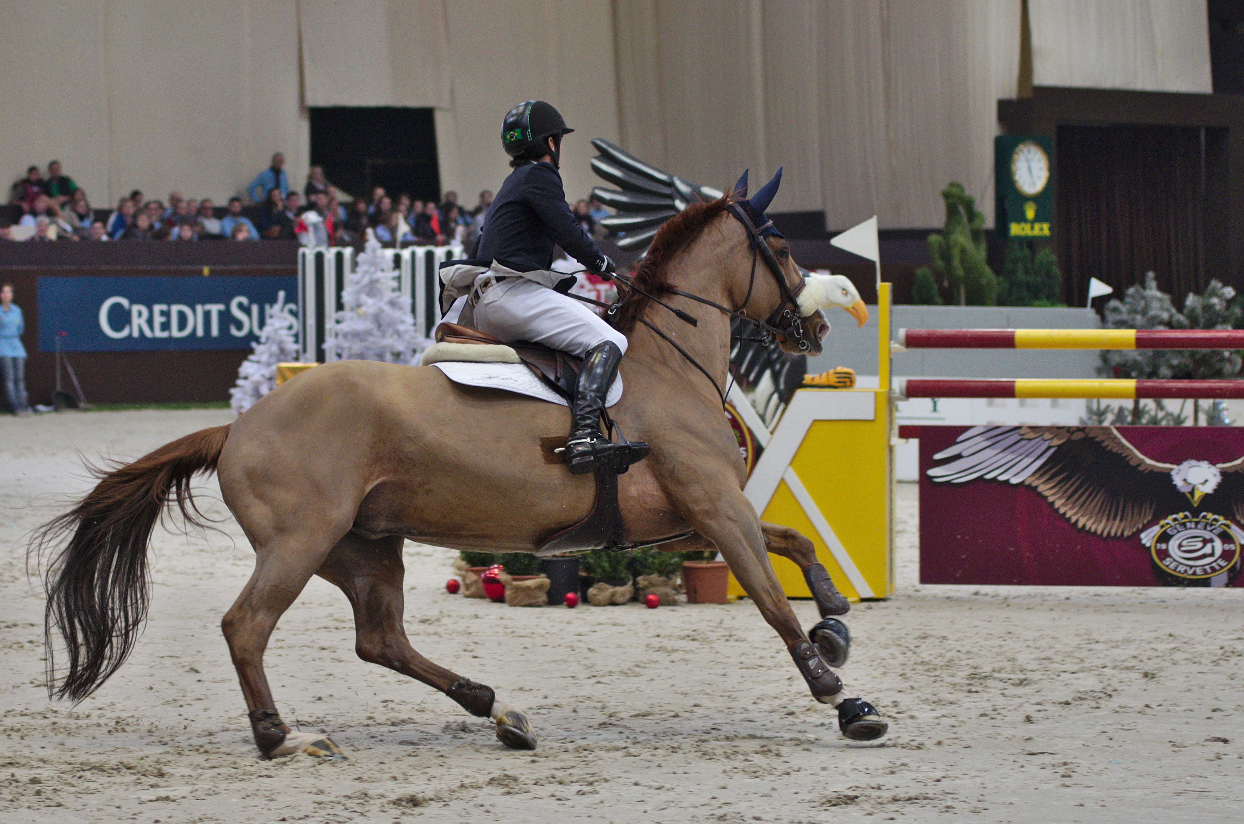 CHI Genève 2013 - 20131214 - Marlon Modolo Zanotelli et Ode des Roches